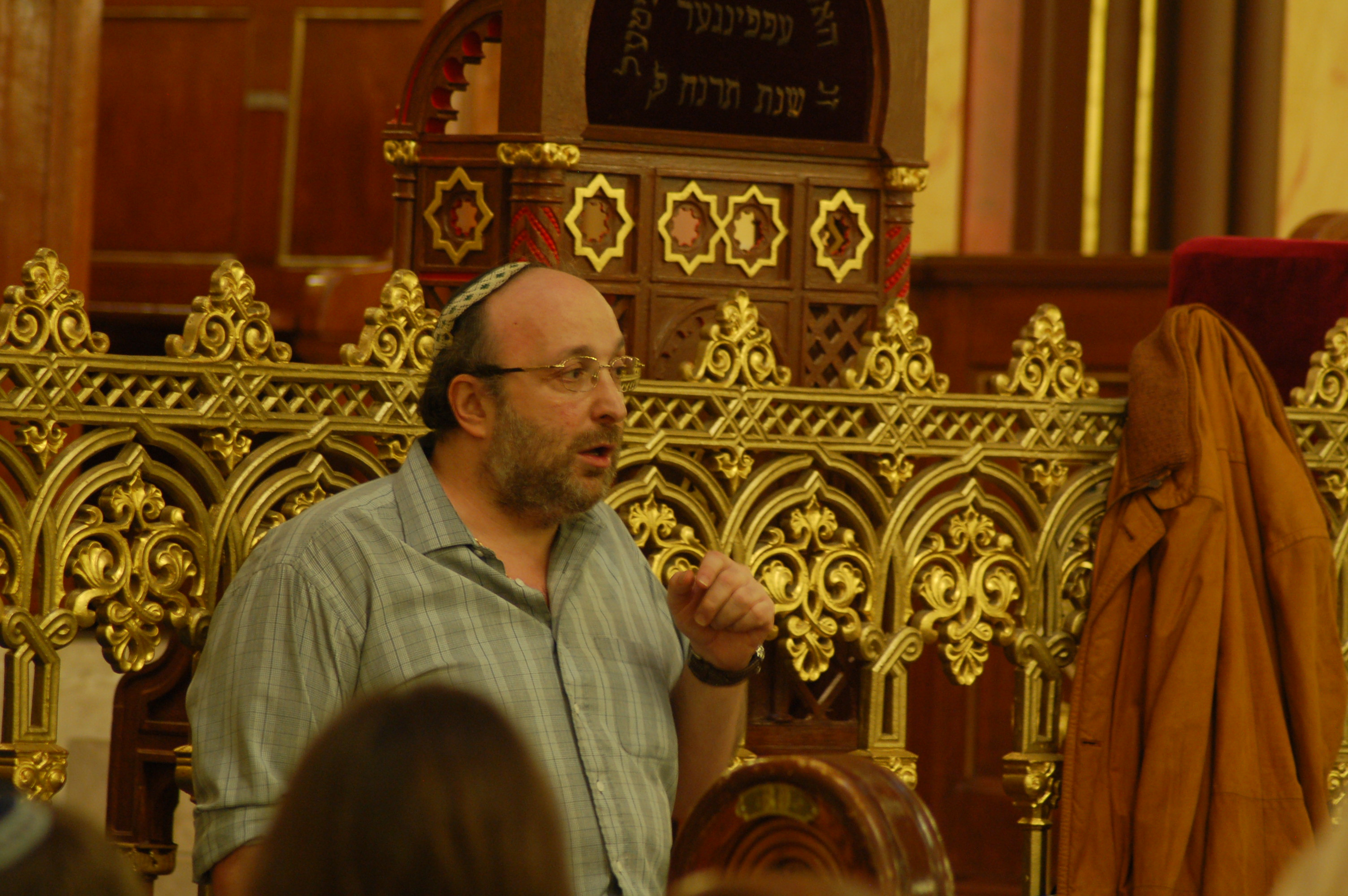 Frölich Róbert főrabbi